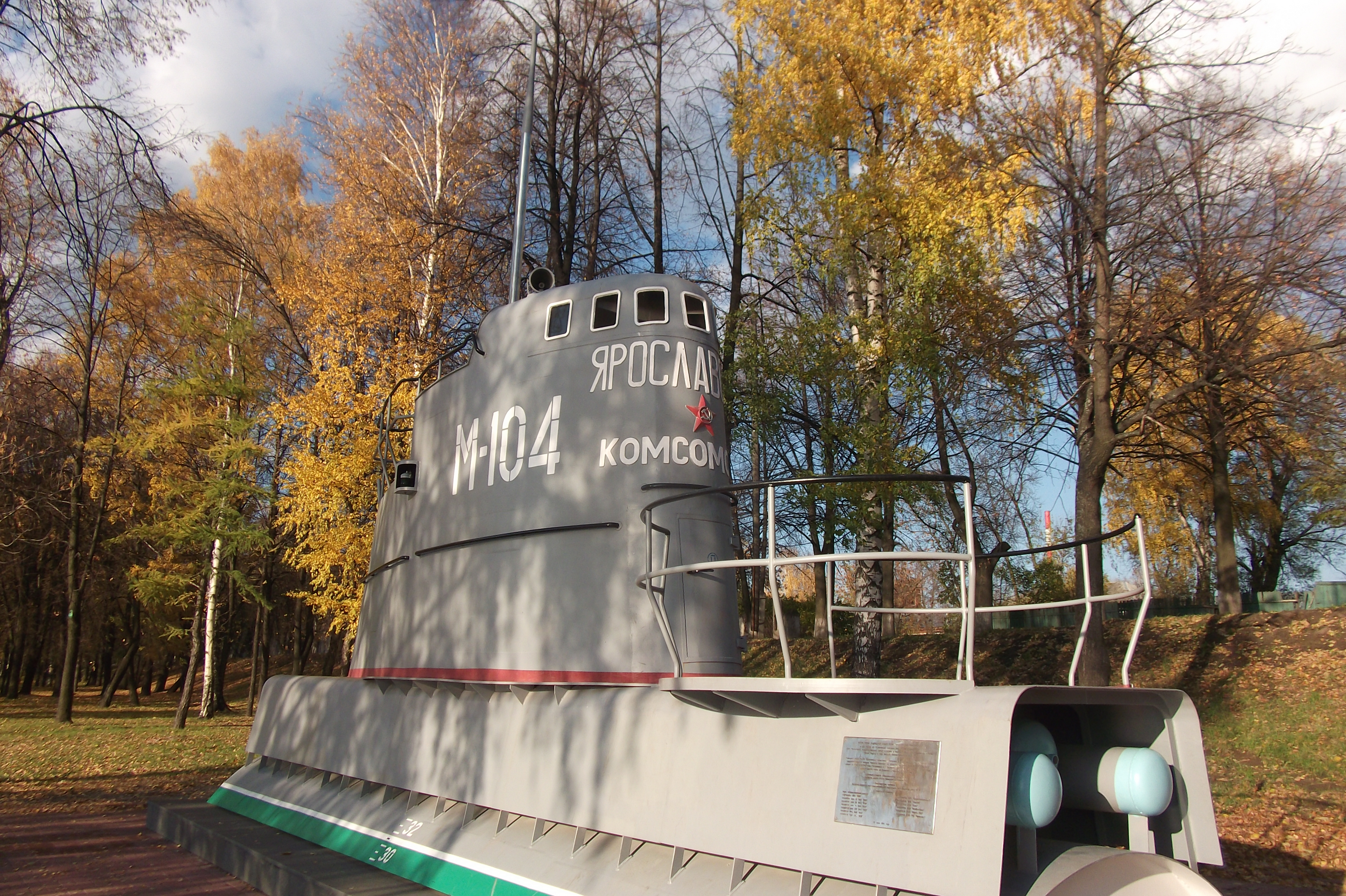 Рубка подводной лодки - памятник на Тверицкой набережной